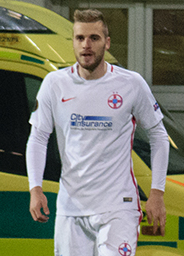 Andrei Vlad